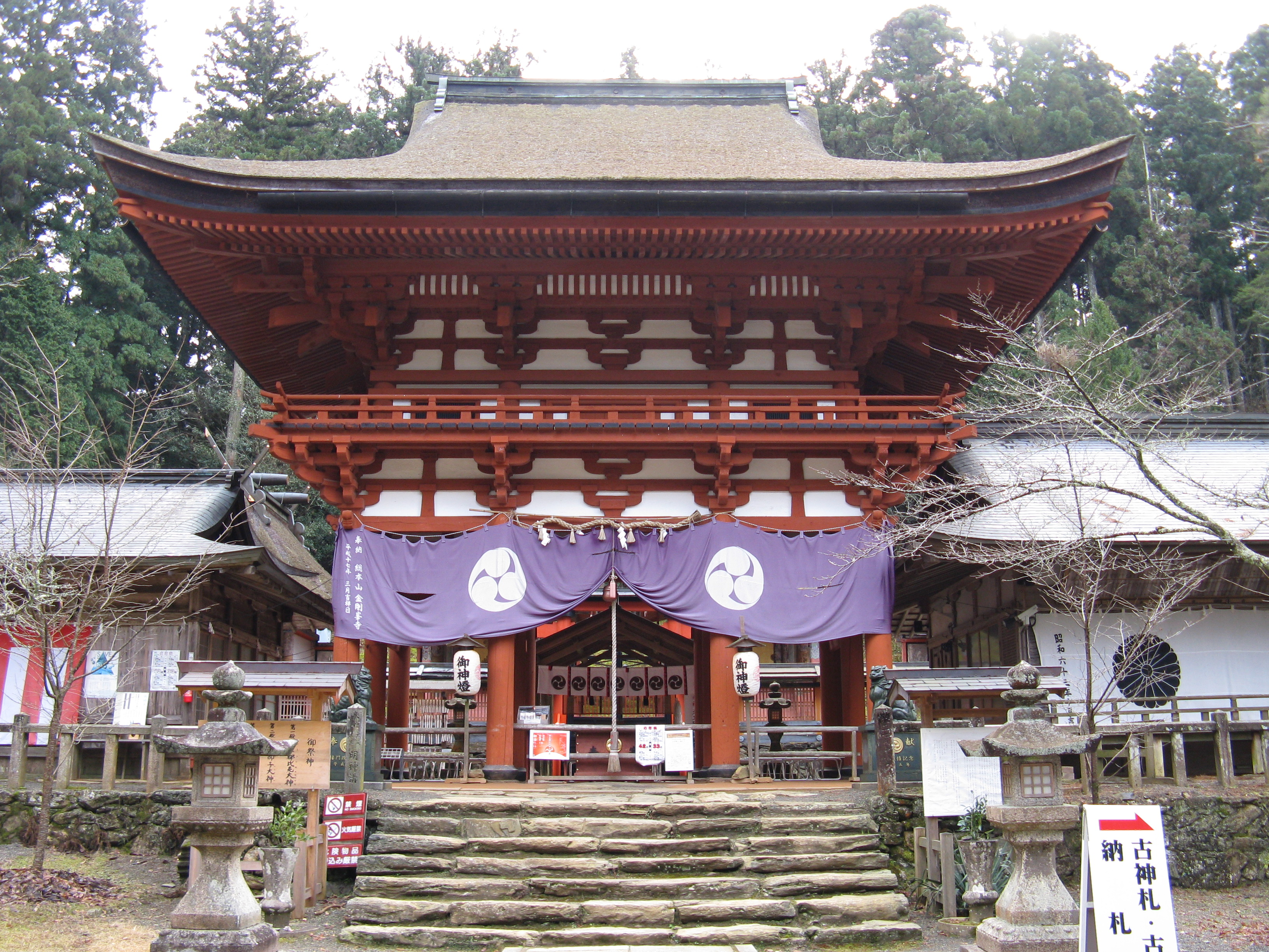 丹生都比売神社 楼門